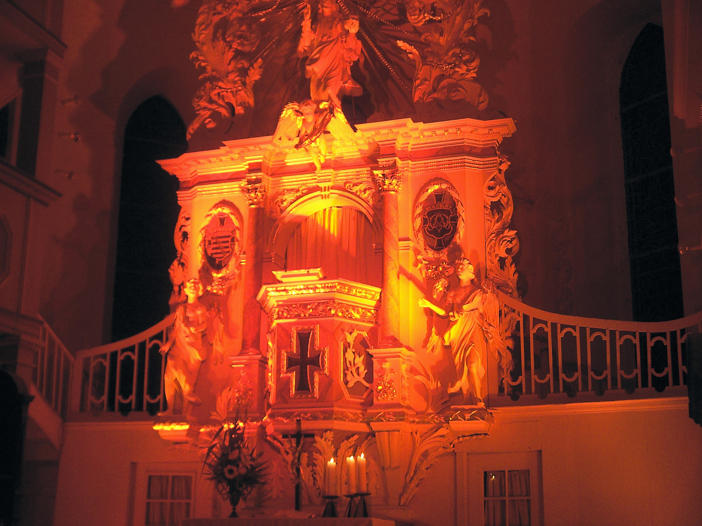 Illuminierter Altar